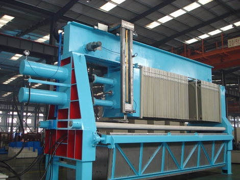 Фиильтр-пресс с верхним подвесом плит